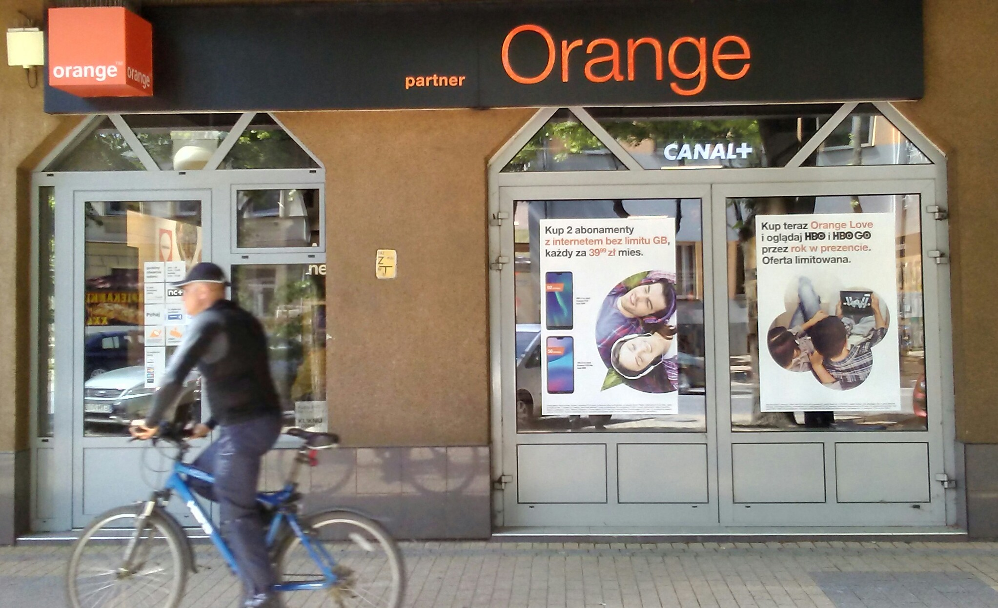 Salon Orange w sześćdziesięcio tysięcznym Tomaszowie Mazowieckim, woj. łódzkie.